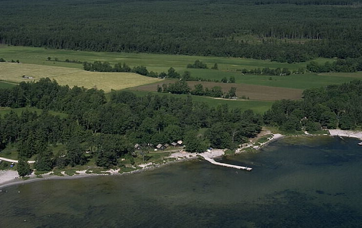 Motiv: Hammars fiskeläge Nyckelord: Flygbilder, Riksintressen Kategori: FiskelägeHammars fiskeläge